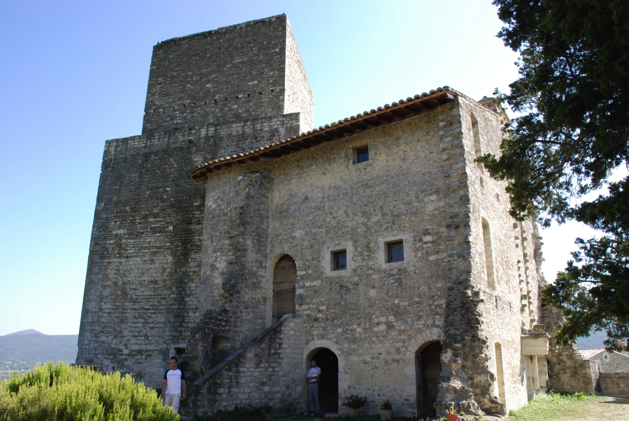 Poetlaval27